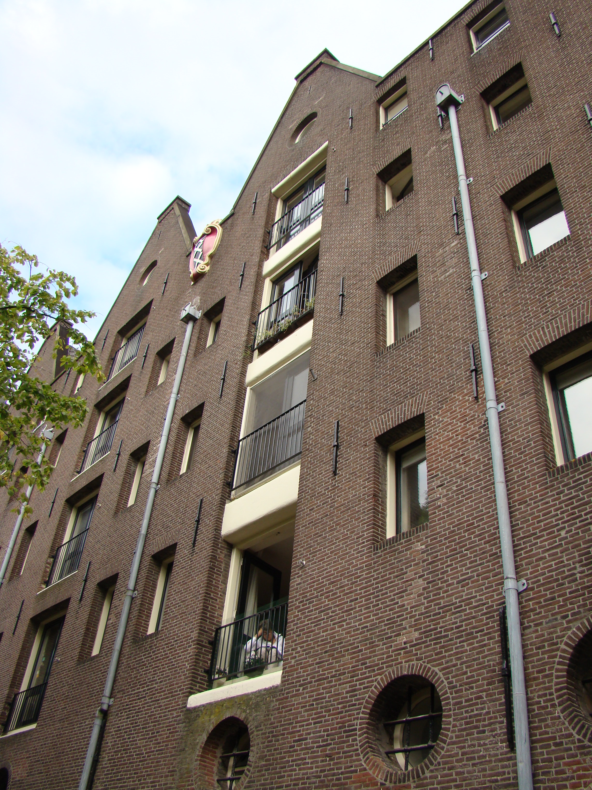 Amsterdam Brouwersgracht 897-905 en 907-915 (vlnr, staande aan de Lijnbaansgracht